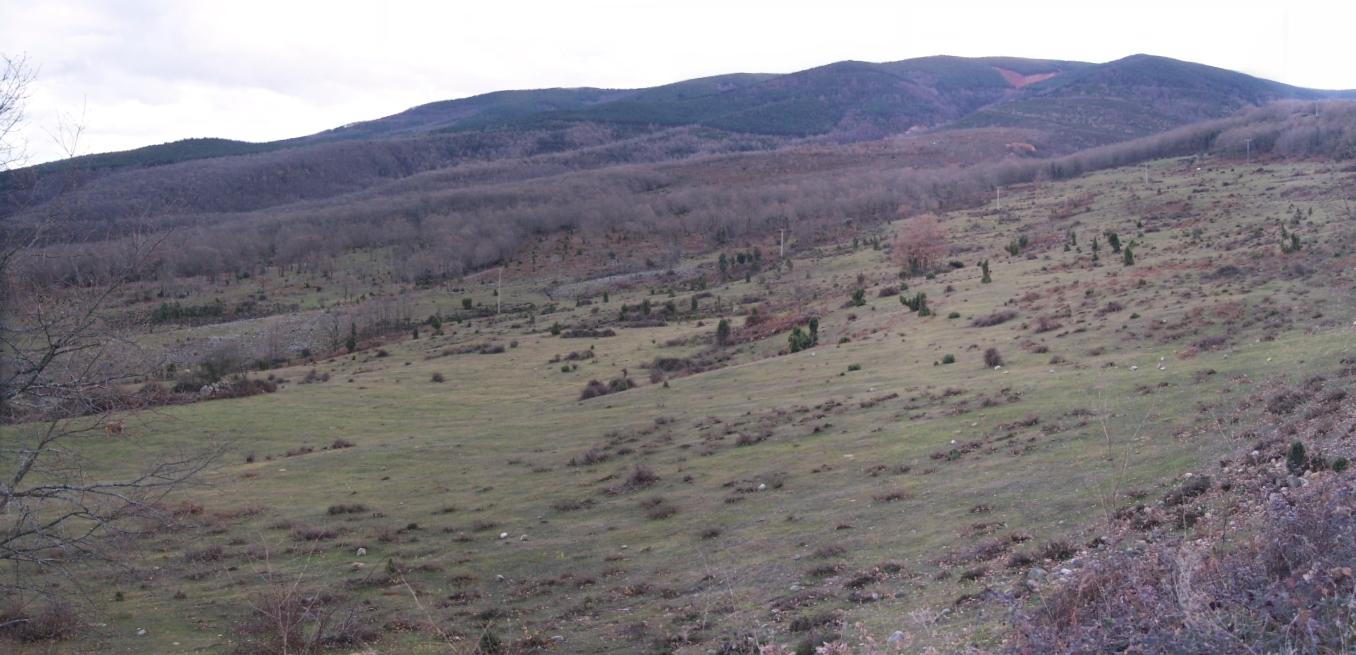 Montaje de varias fotos de la Sierra de Moncalvillo hecha cerca de la granja Ochoa, en la carretera de acceso a la cima.